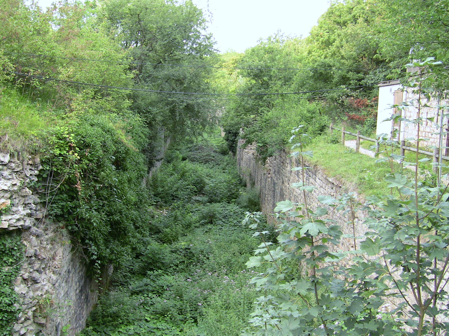 Un fossé du fort de Planoise.